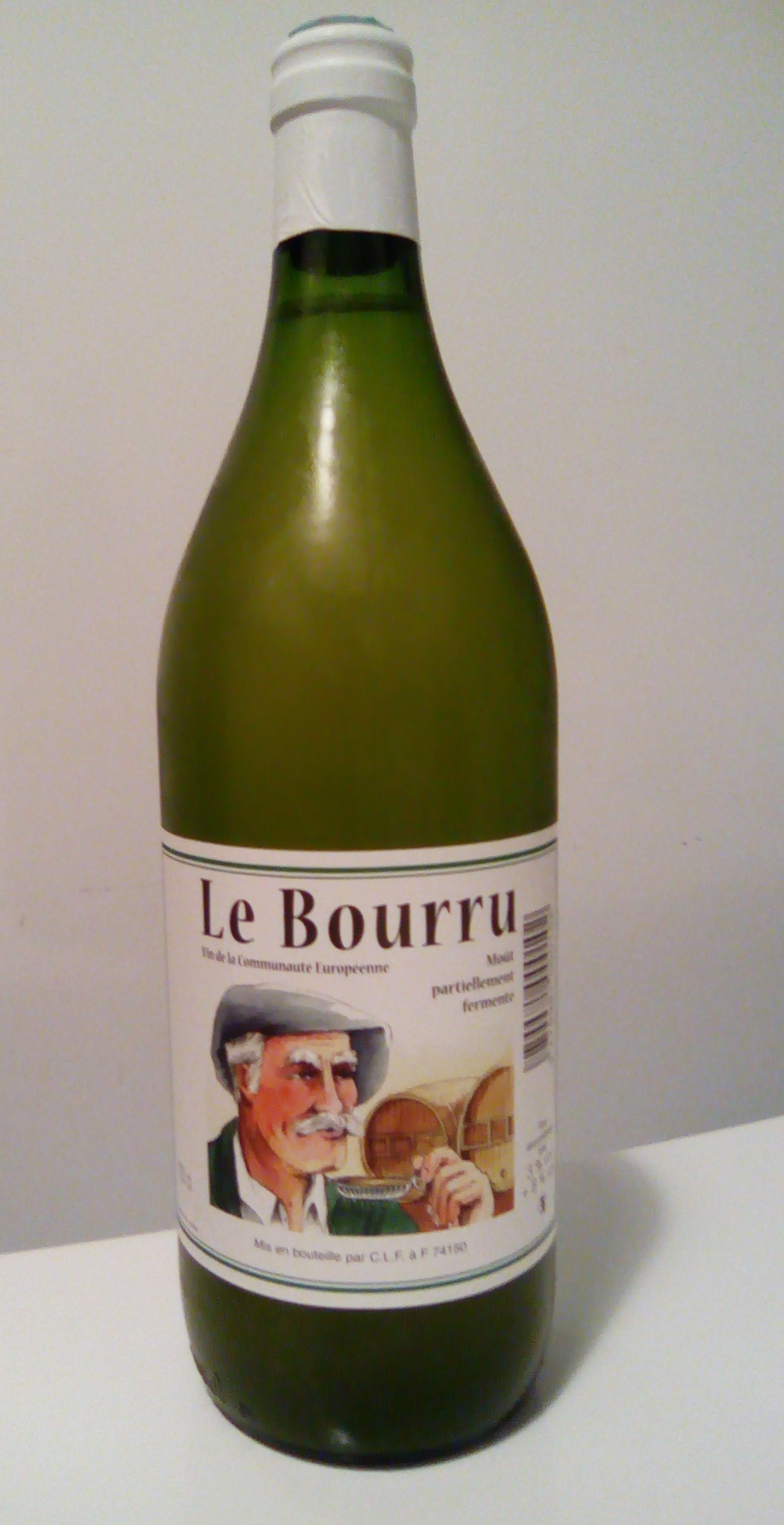 Bouteille de vin bourru savoyard.